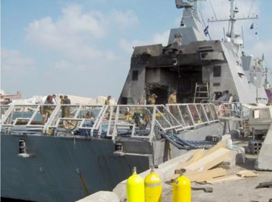 אח"י חנית בתיקונים בבסיס אשדוד נזקי השריפה בצד שמאל של המבנה